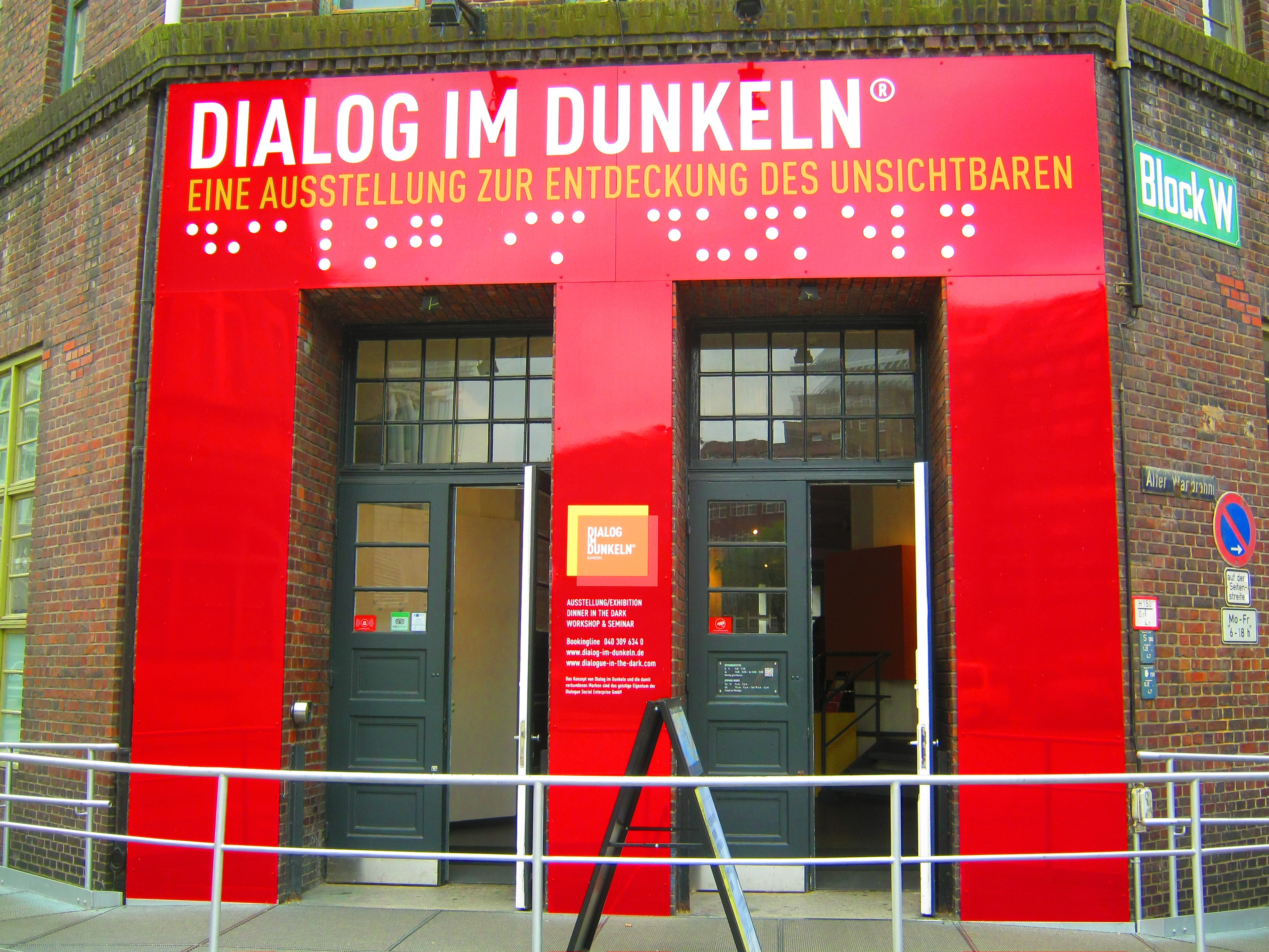 Eingang der Ausstellung und sozialen Begegnungsstätte "Dialog im Dunkeln" in Hamburg-Hafencity.